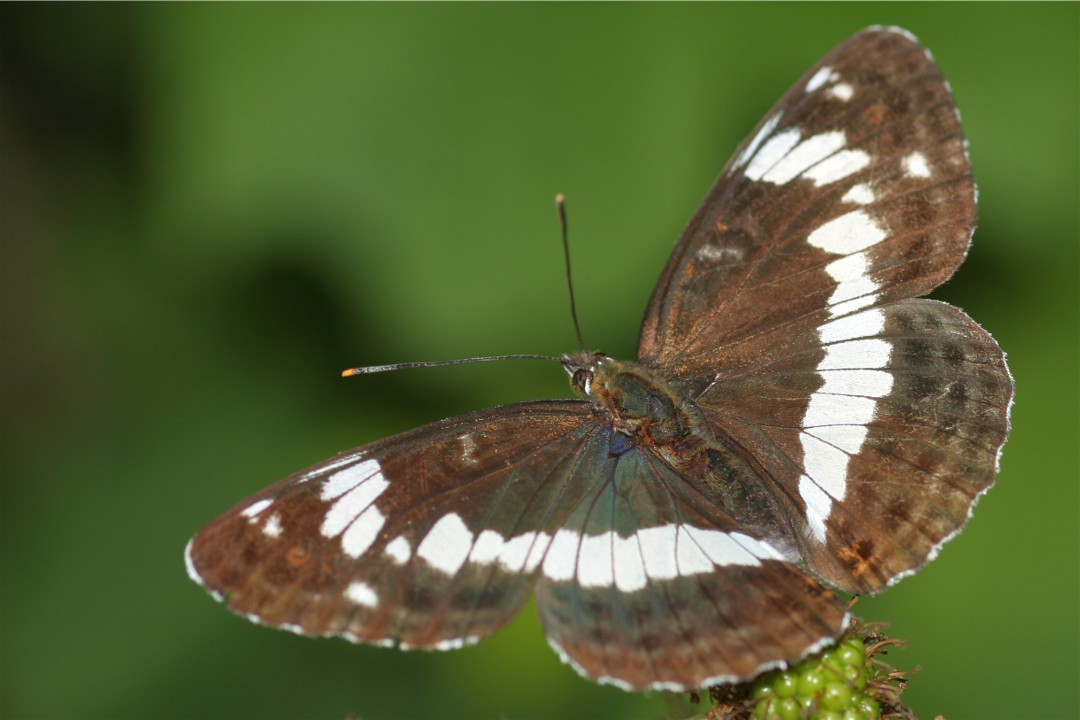 Kleiner Eisvogel (Limenitis camilla)